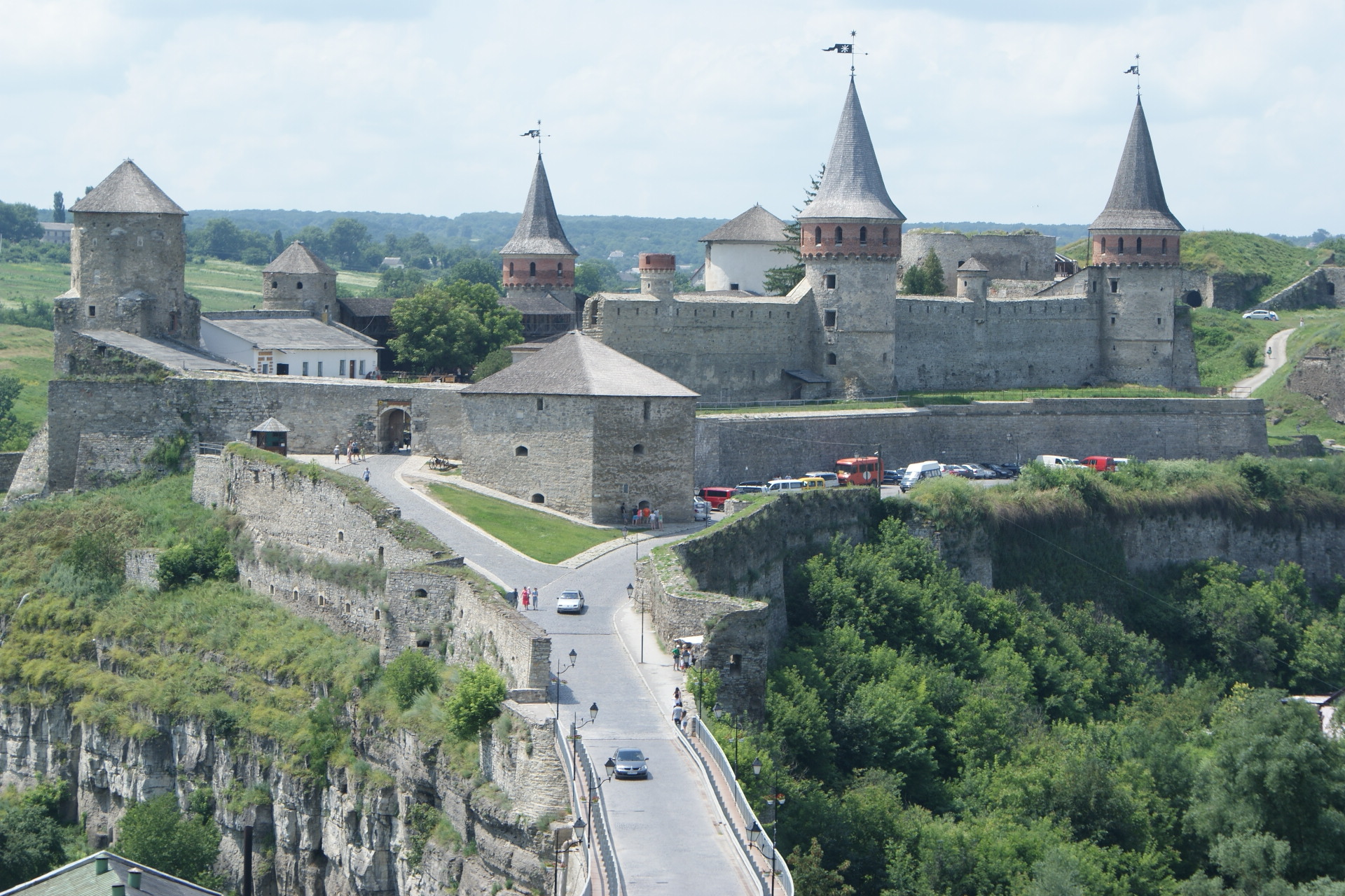 Widok starego zamku